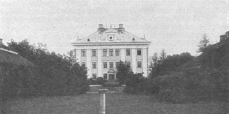 Sarvlaks i Pernå, Finland. Ur verket "Det svenska Finland, förra delen", utgiven i Helsingfors/Stockholm 1919-1921, sidan 153.